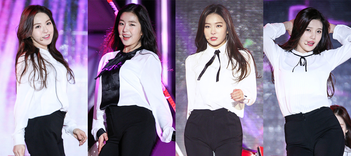 141211 레드벨벳 더쇼 in 코엑스 야외무대